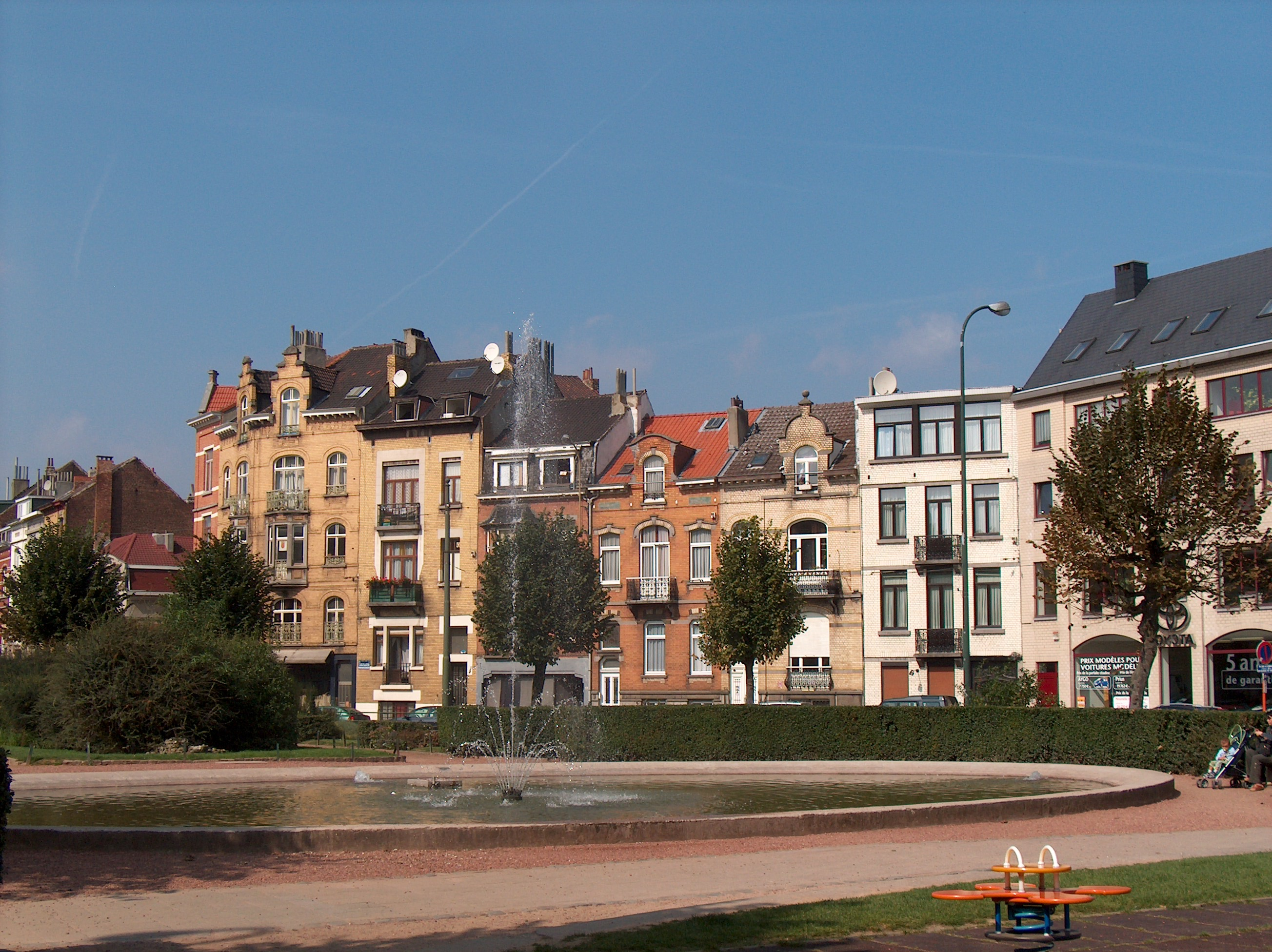 Bruxelles, Schaerbeek, place de la Patrie